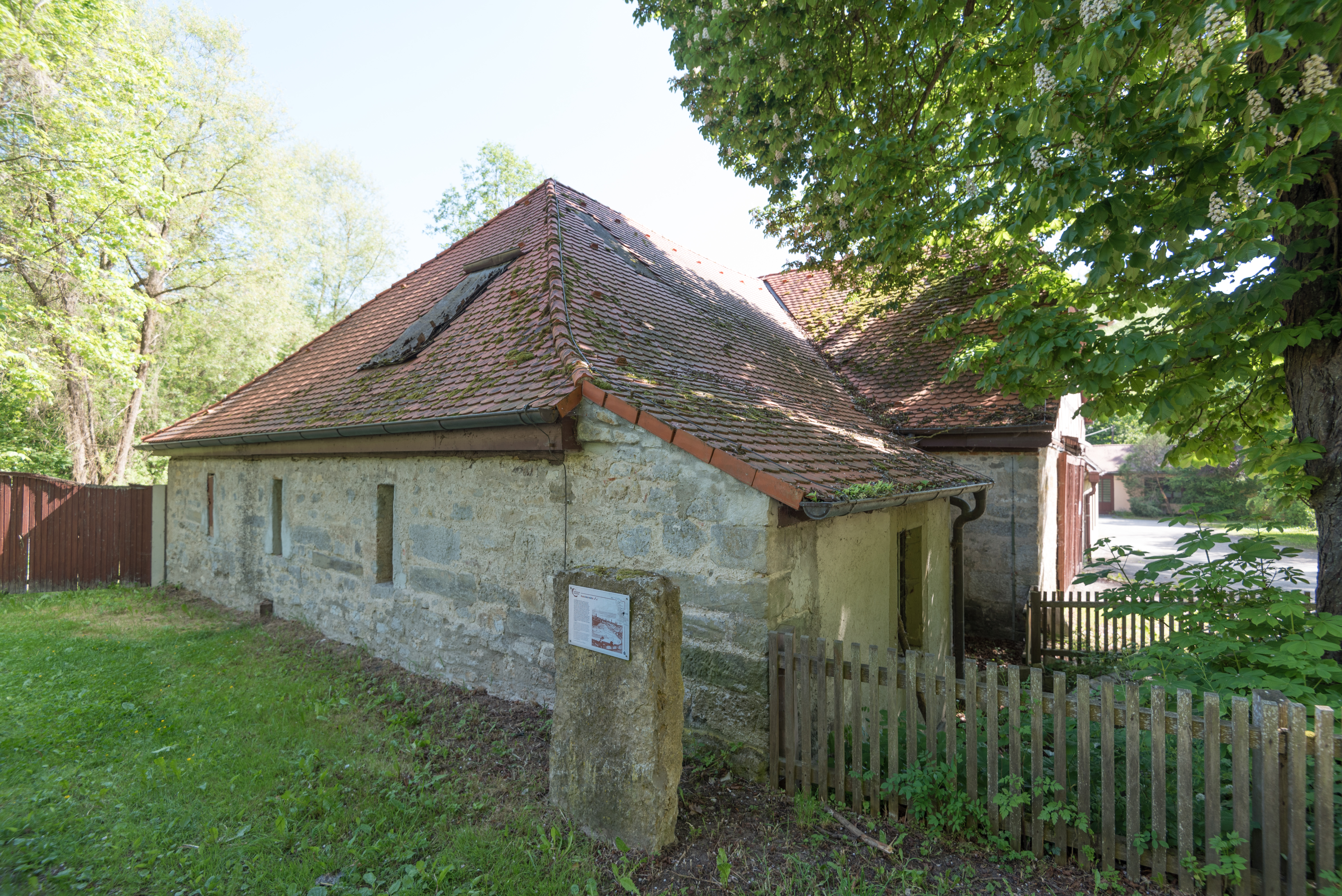 Rothenburg ob der Tauber, Taubertalweg 80